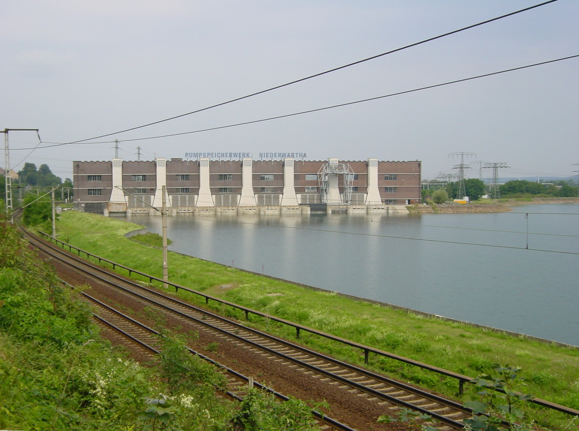 Niederwartha-Kraftwerk